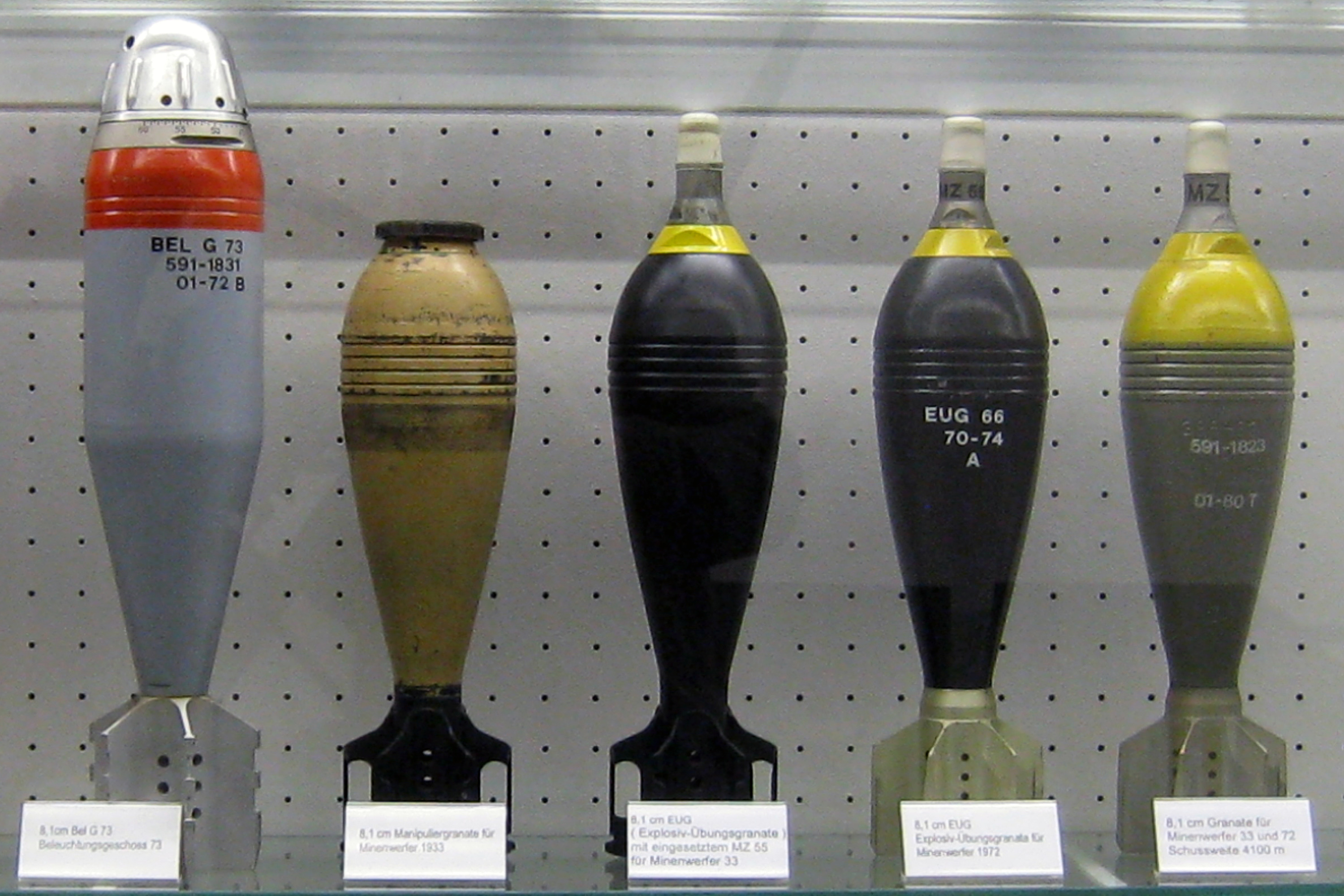 Munition für 8,1 cm Minenwerfer der Schweizer Armee, fotografiert in der Festung Heldsberg, St. Margrethen, Kanton St. Gallen. V.l.n.r.: Beleuchtungsgranate 73, Manipuliergranate, Explosiv-Uebungsgranate (zweimal), Wurfgranate